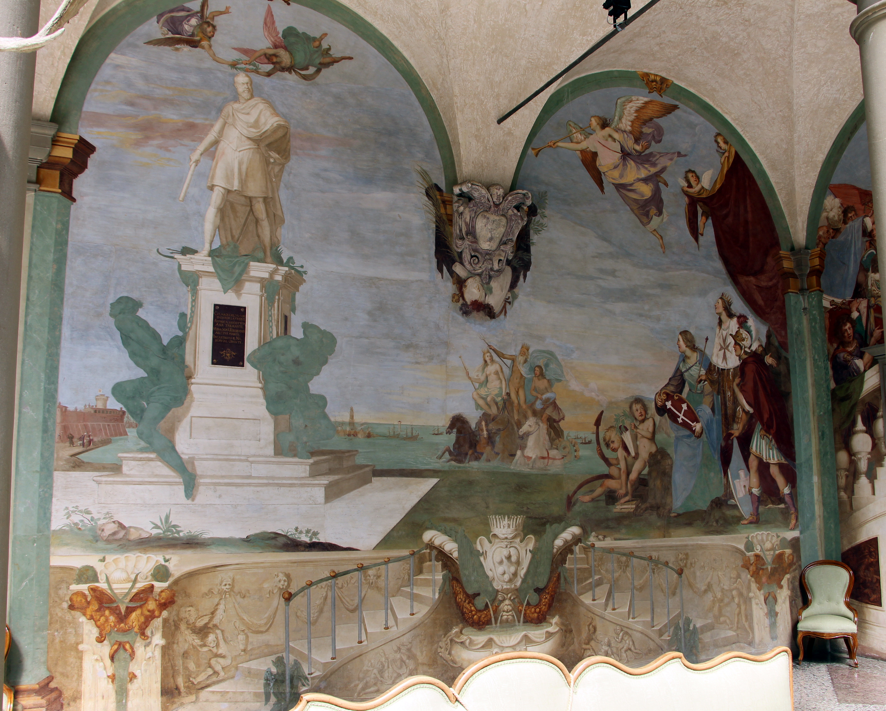 Villa medicea della Petraia - MIBAC The making of this document was supported by Wikimedia CH. (Submit your project!) For all the files concerned, please see the category Supported by Wikimedia CH. This is a photo of a monument which is part of cultural heritage of Italy.